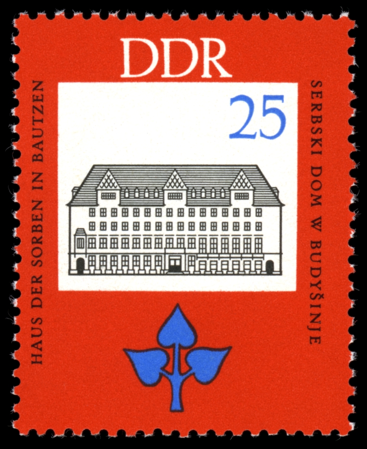 Information: Ausgabepreis: First Day of Issue / Erstausgabetag: Auflage: Entwurf: Druckverfahren: Michel-Katalog-Nr: Ländercode-MiNr